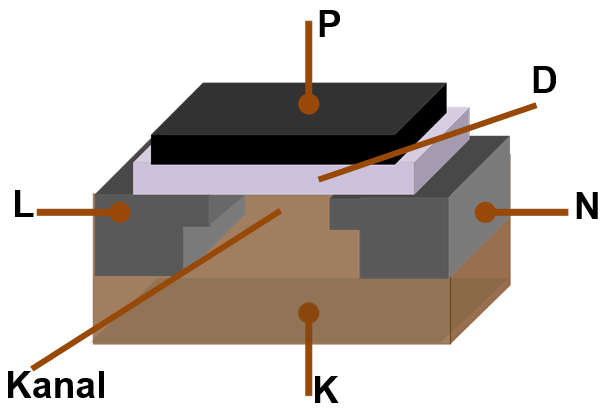 Pilt MOSFET-ist